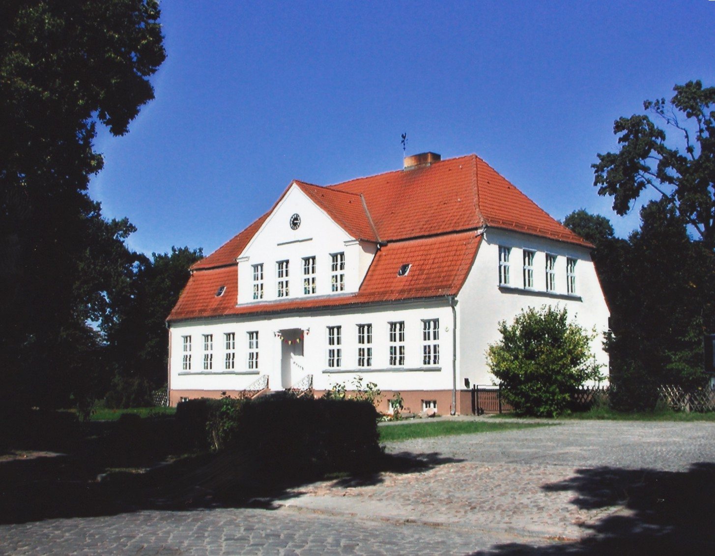 Ortsteil Wandlitz der Gemeinde Wandlitz